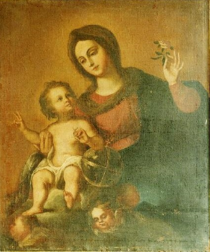 La obra representa a la Virgen María acompañada por su hijo, el Niño Jesús.